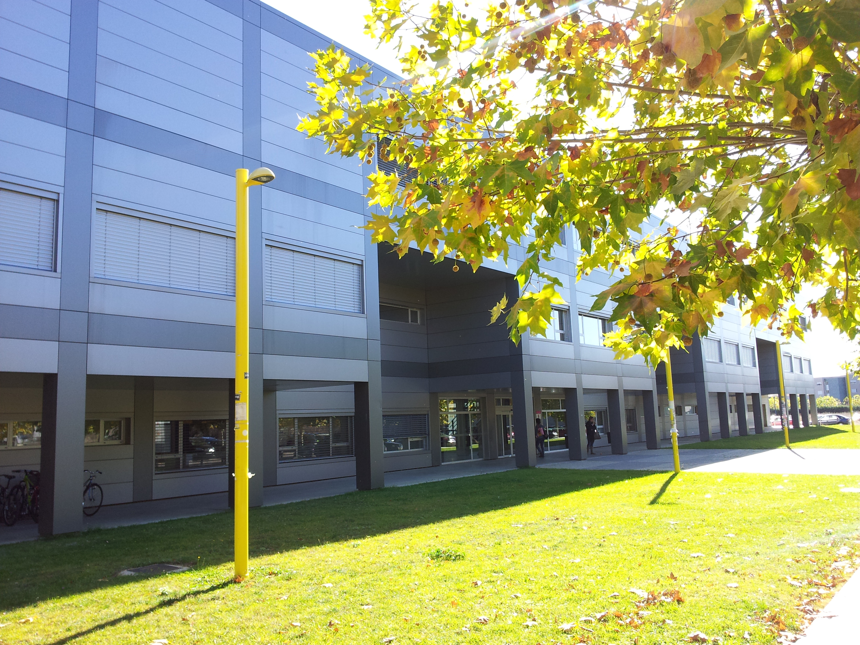 Centro de recursos informáticos de la ULE. Sede del supercomputador "Caléndula", segundo en potencia de España.